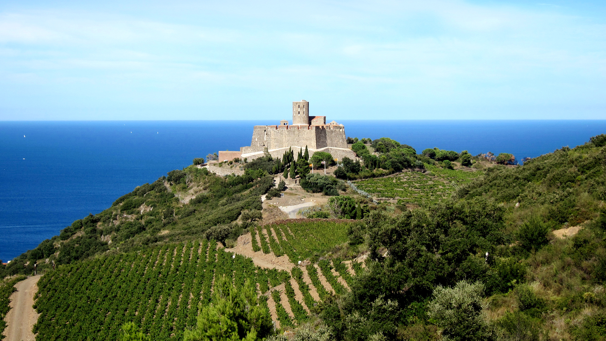 Fort Saint Elme